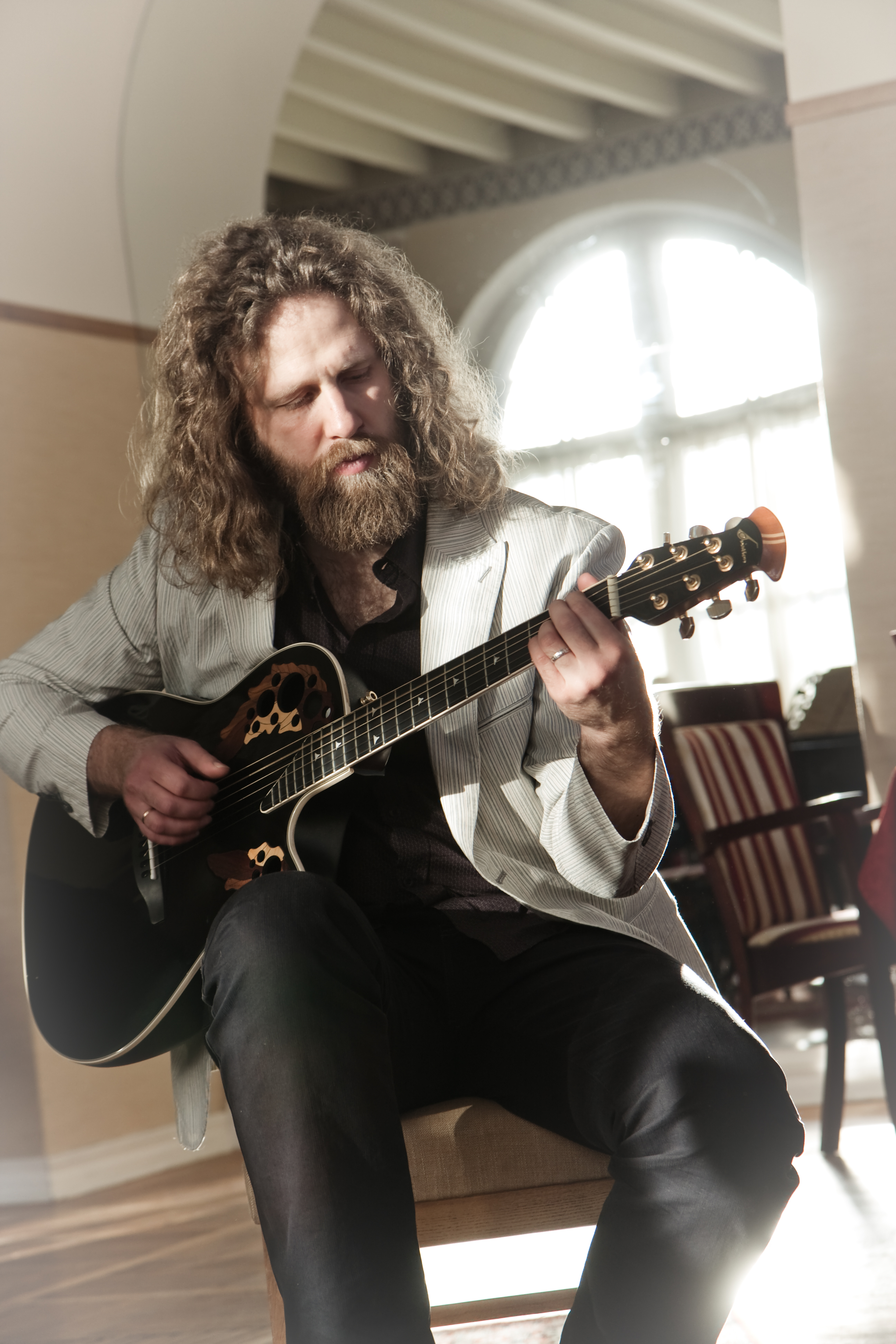 Kitarrist Oleg Pissarenko Tartu Jazziklubis